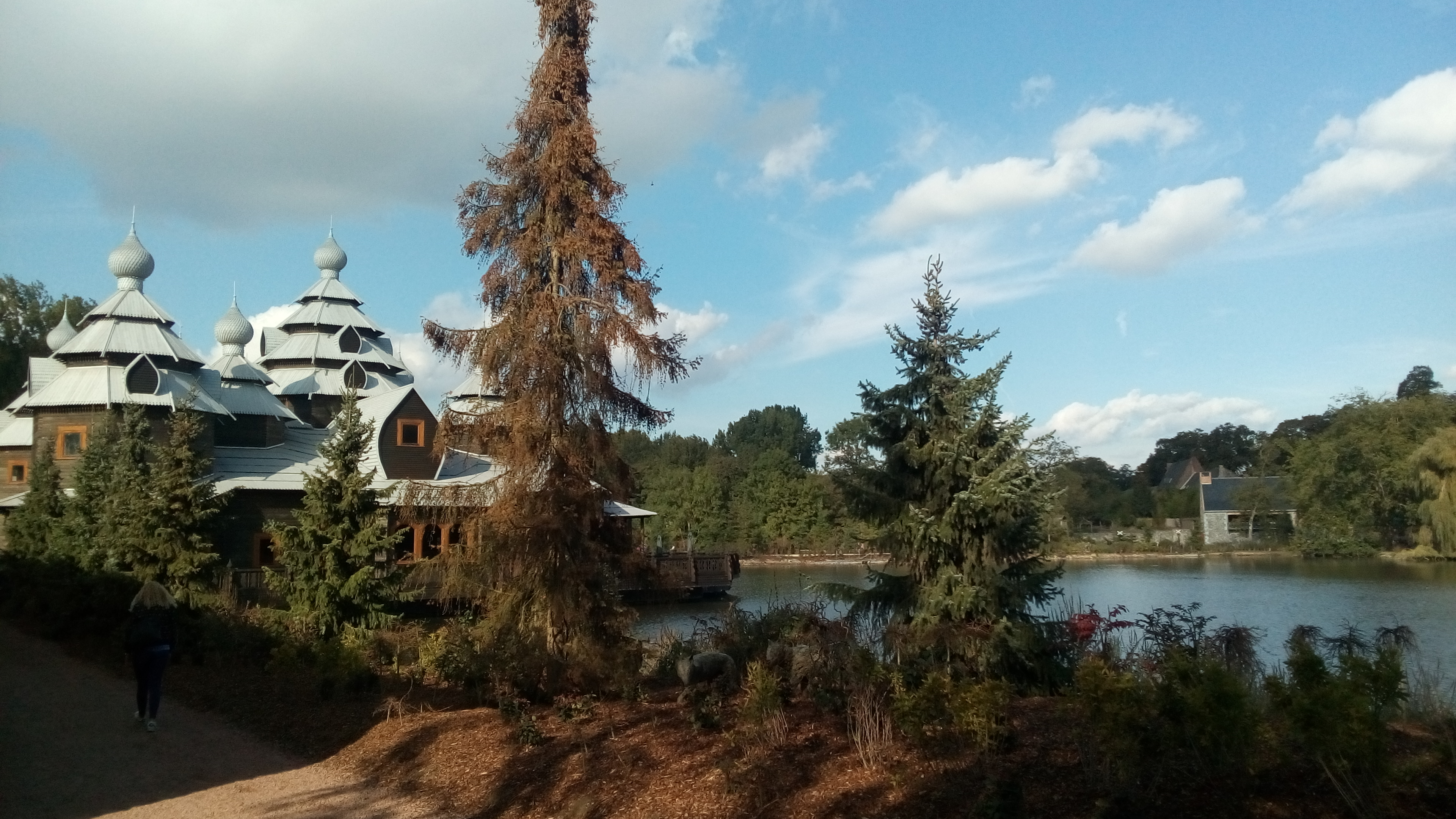 Une vue sur l'Izba de Pairi Daiza.